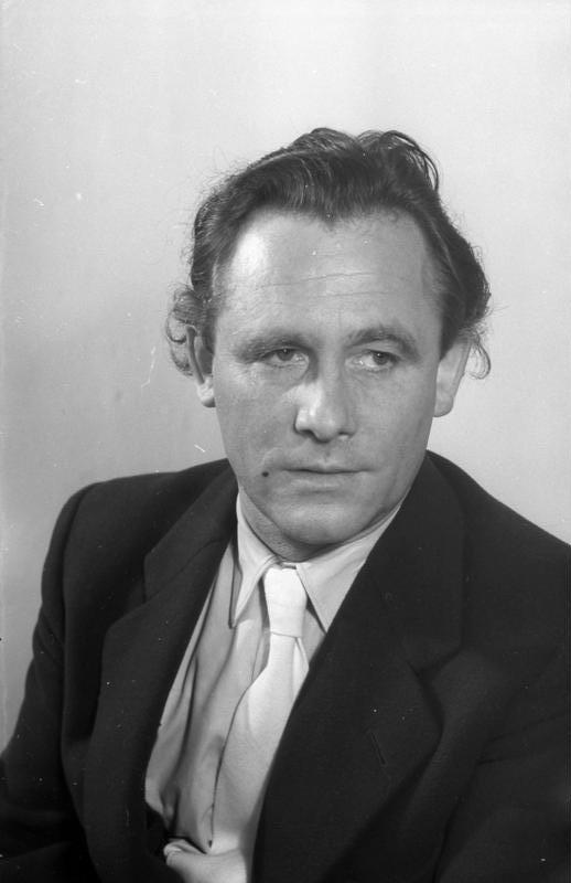 Zentralbild Gielow 19.9.1952 Prof. Hermann Henselmann Architekt, geb. 3.2.1905 in Roßla (Harz) Professor in Berlin, Direktor des Instituts für Theorie und Geschichte der Baukunst an der Deutschen Bauakademie. Als Chefarchitekt im Demokratischen Berlin hat er großen Anteil am Wiederaufbau Berlins.